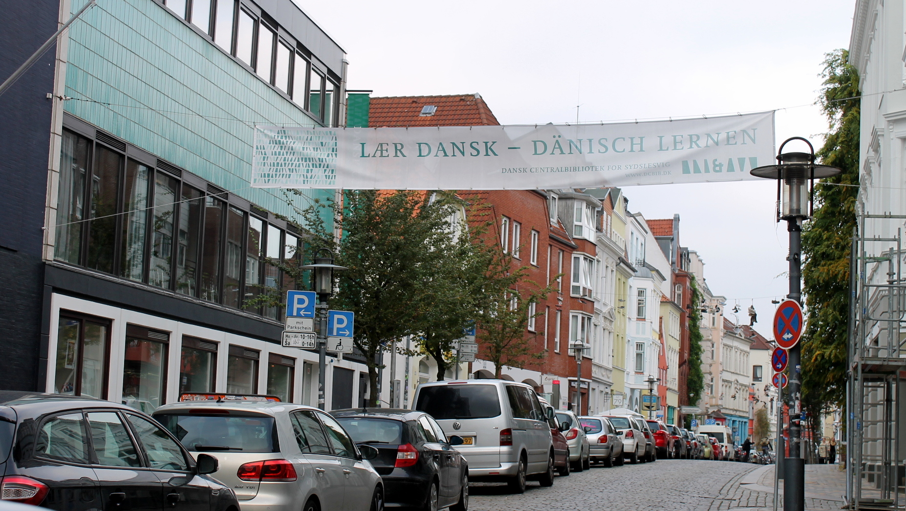 Reklame for en dansk sprogskole i Flensborg, Tyskland